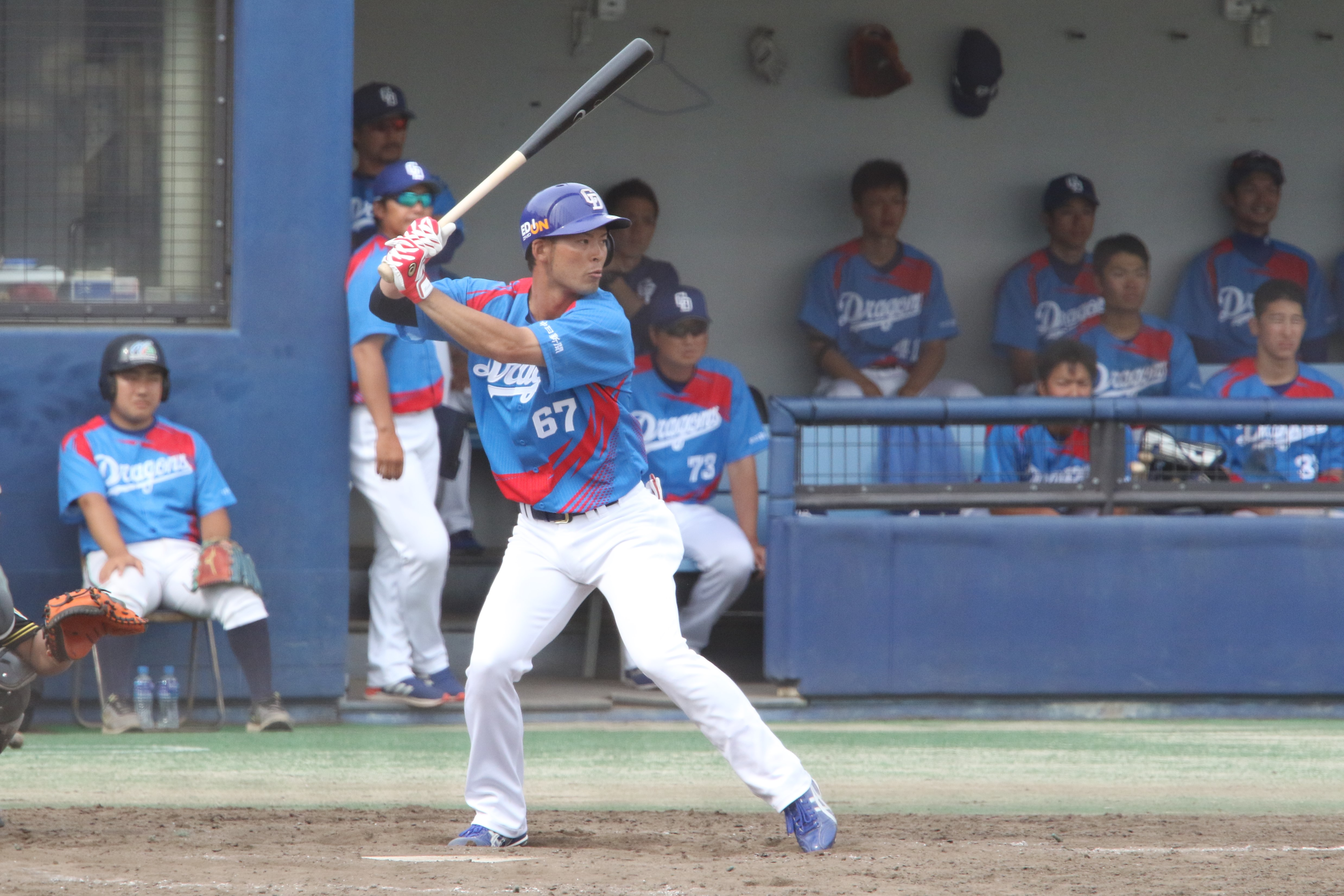 支配下登録後の近藤 （2018年5月26日、ナゴヤ球場にて）